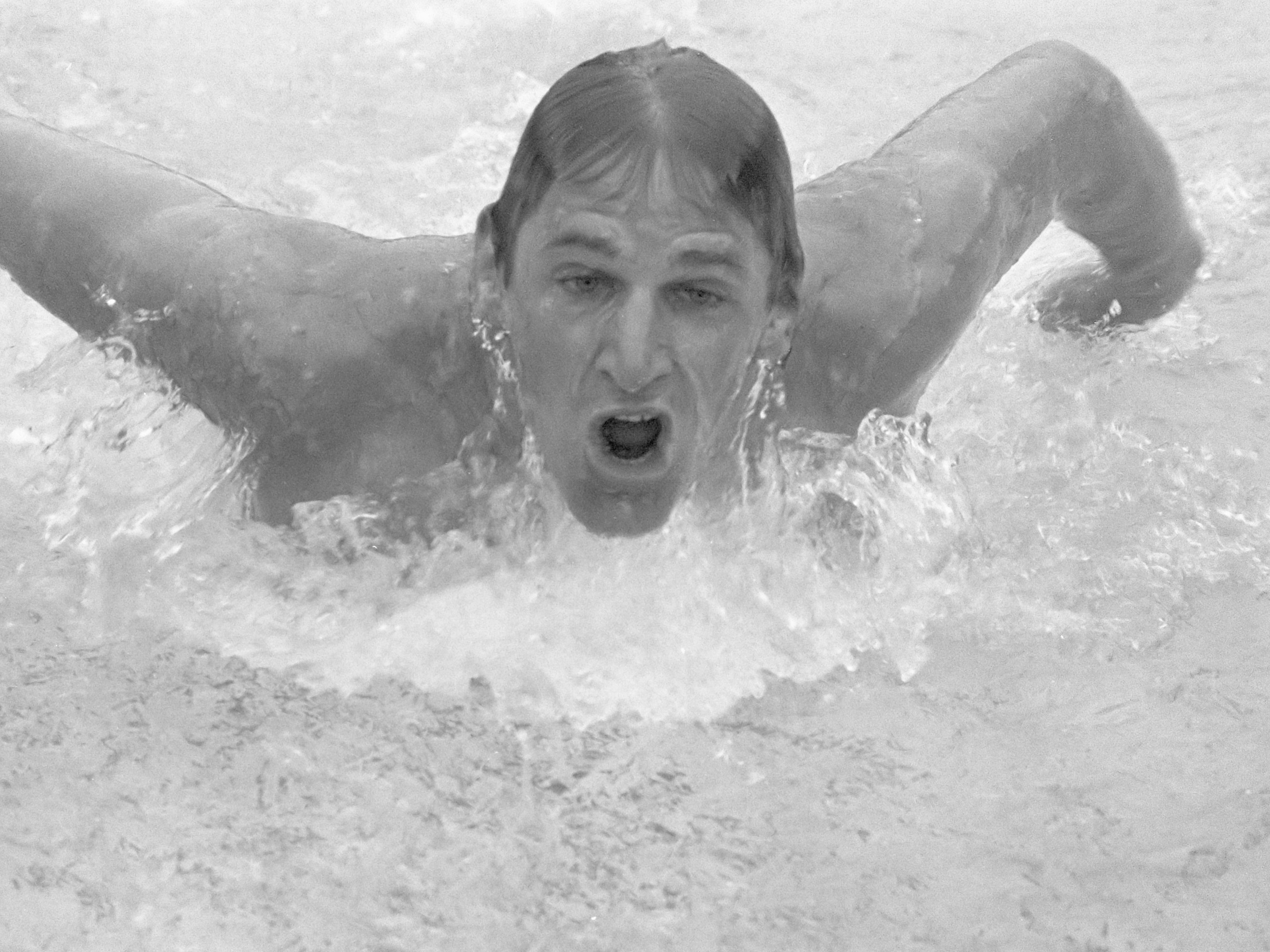 Nationale zwemkampioenschappen te Utrecht, Arnold Rood aktie 26 juli 1972